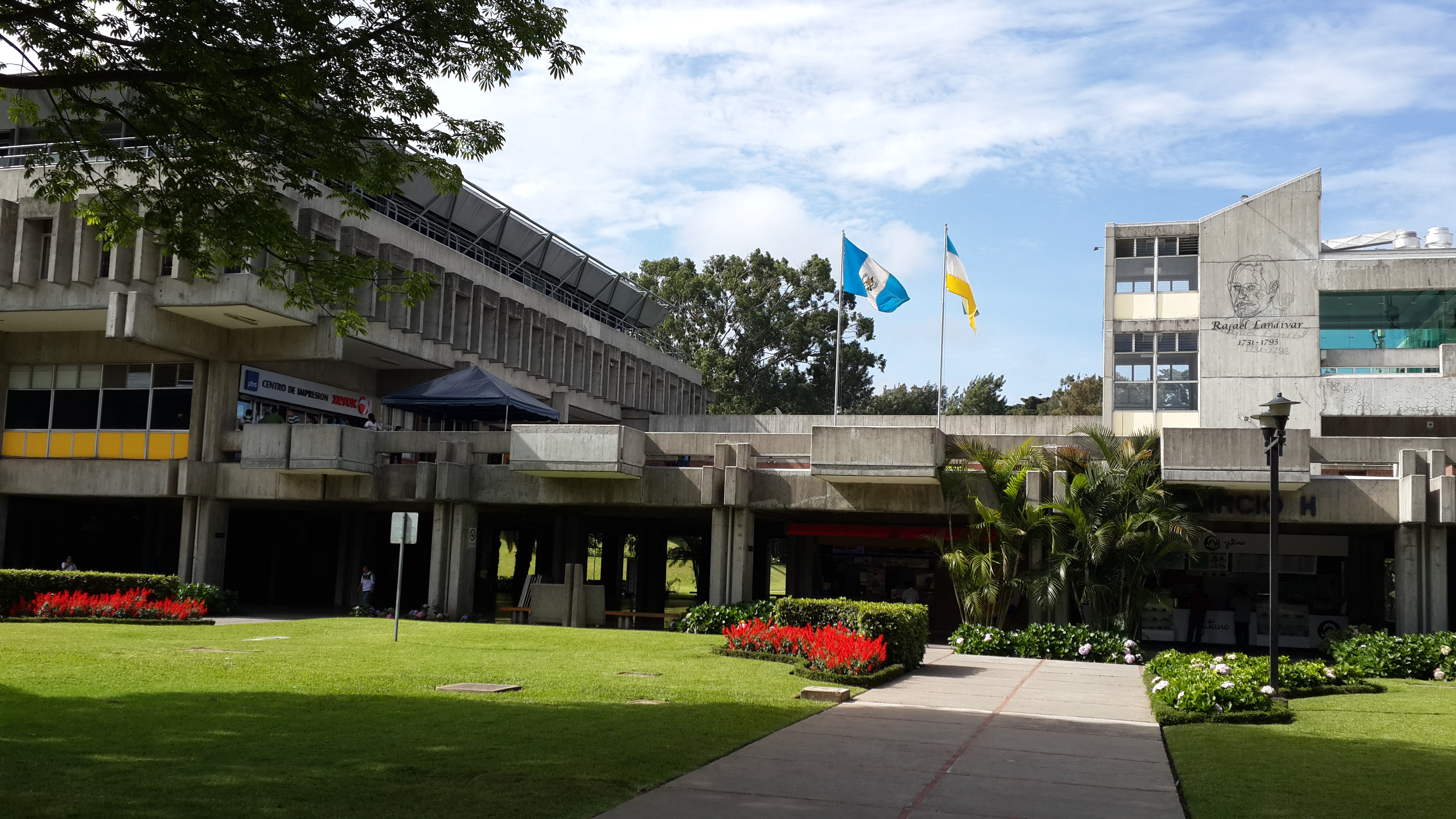 Edificio H, Campus Central, Universidad Rafael Landivar, Guatemala